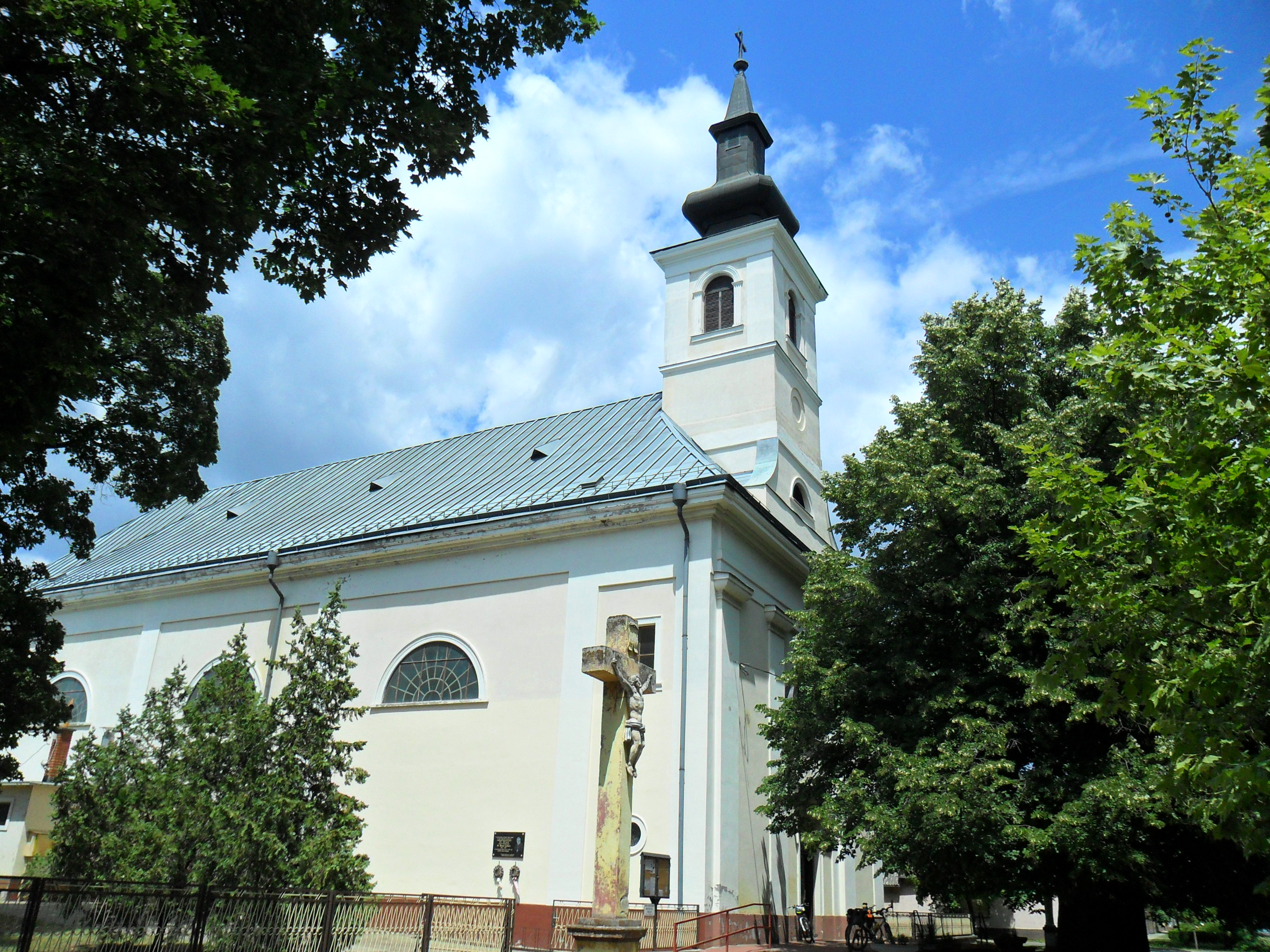 Mindenszentek római katolikus templom (Sükösd, Deák Ferenc u. 1.)